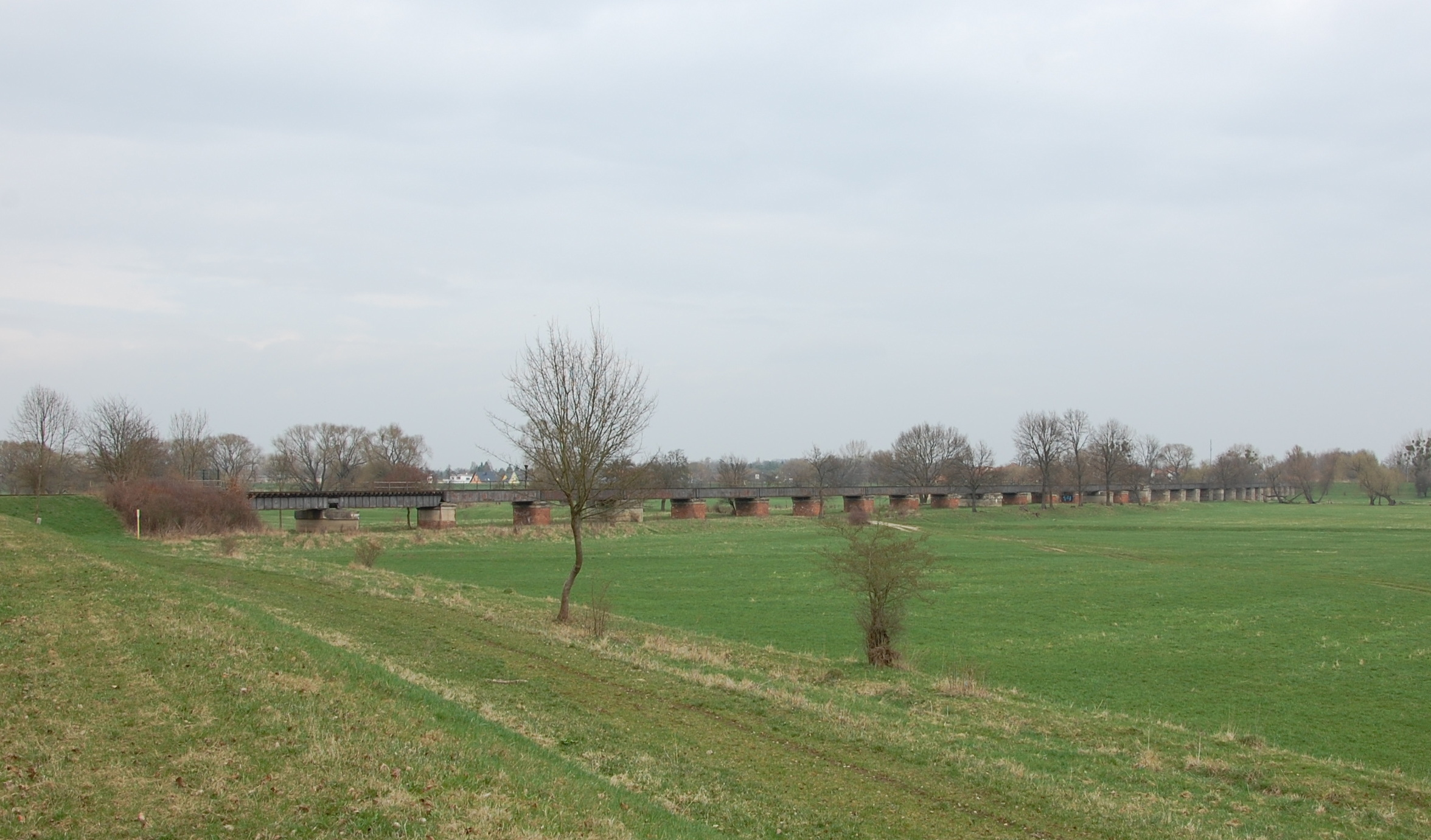 Eisenbahnflutbrücke Berliner Chaussee